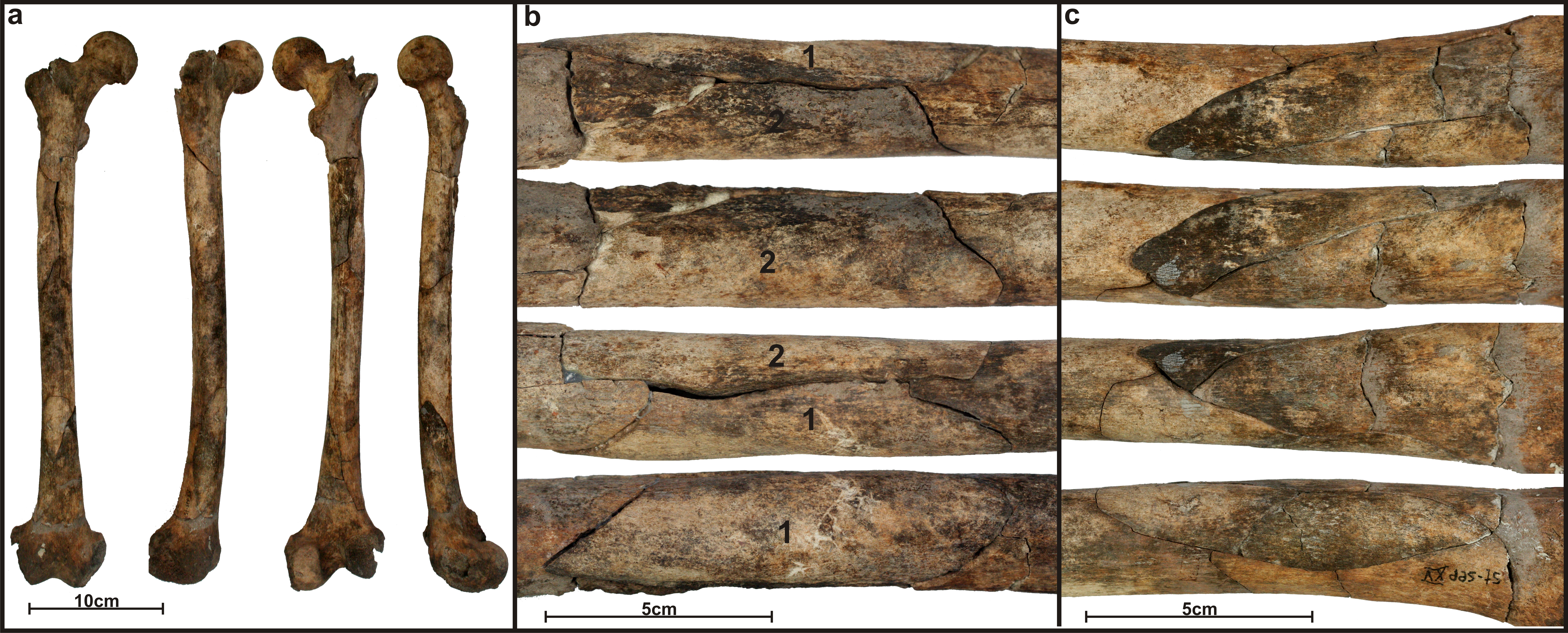 Lapa do Santo - Sepultamento 15 - Fratura perimortem - Femur direito. Diversos ossos longos desse indivíduo apresentavam fraturas ósseas que foram gerados em torno da hora da morte. a) vistas anterior, lateral, posterior e medial. b) vistas posterior, medial, anterior e lateral da extremidade proximal. A diáfise e a epífise estão separadas por dois fragmentos que estão divididos por uma fratura longitudinal; c) vistas posterior, medial, anterior e lateral da extremidade distal. O conjunto de fraturas que está presente na extremidade distal apresenta um nítido componente helicoidal, que se expressa nitidamente nesses dois fragmentos